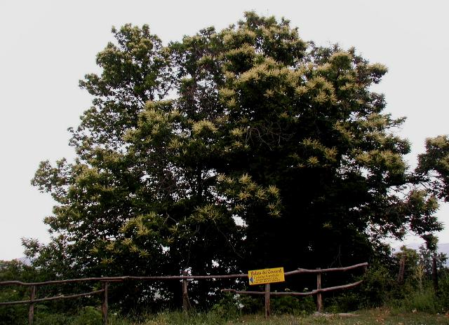 Castanea sativa near Monte Padrone, Corsica.